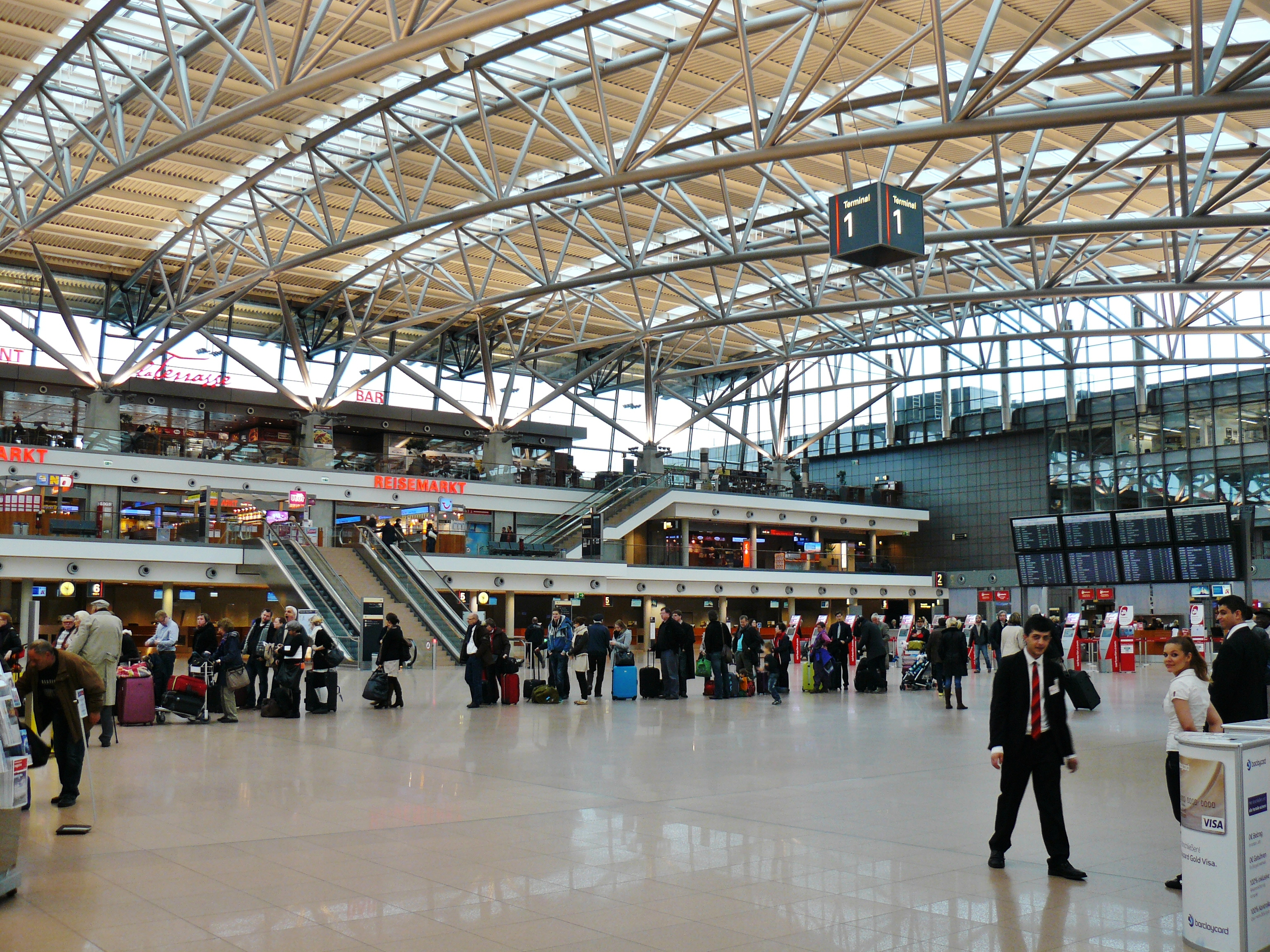 Hamburg Airport, Flughafen Hamburg-Fuhlsbüttel (HAM)